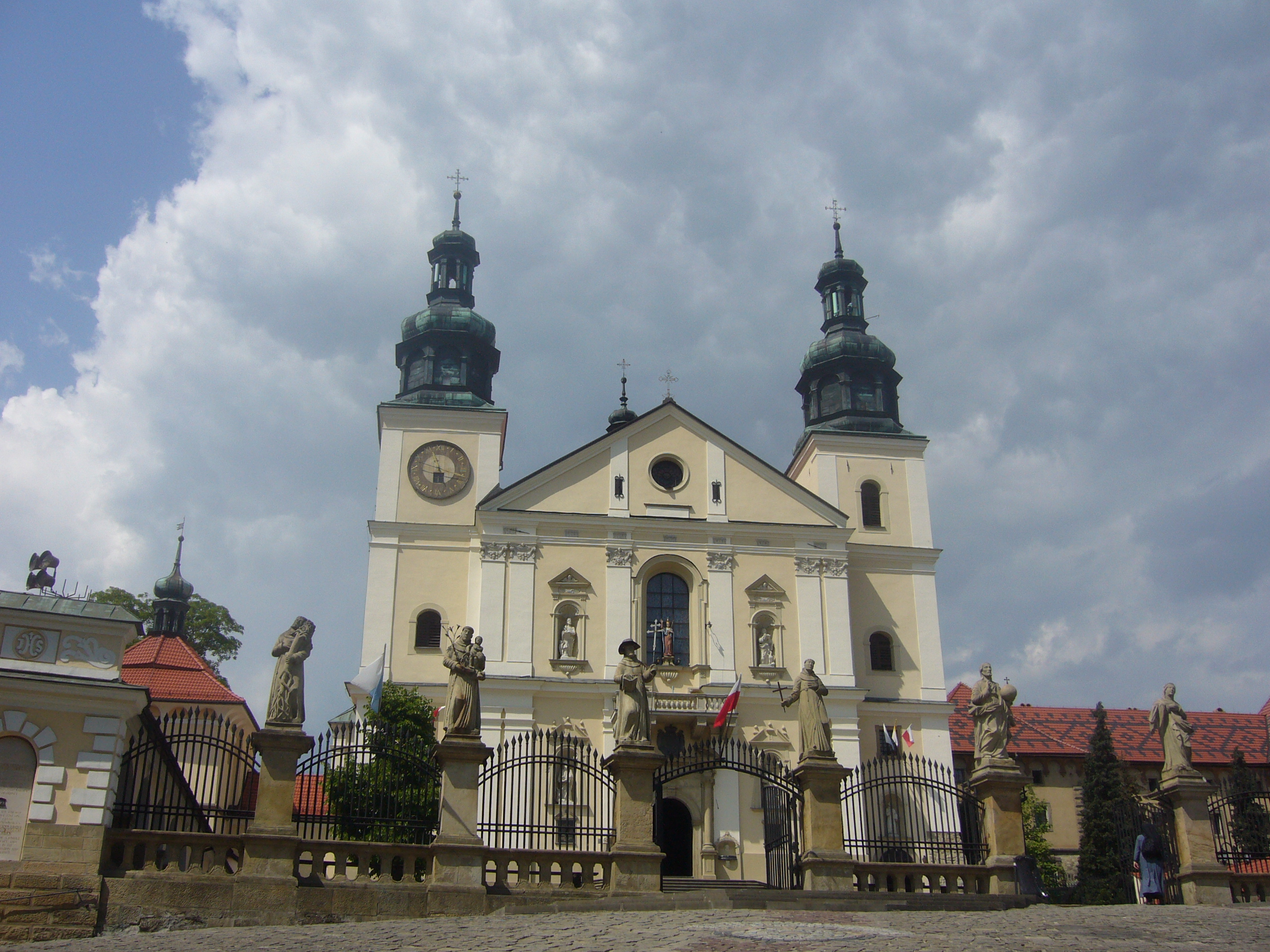 Kalwaria Zebrzydowska, kościół p.w. Matki Boskiej Anielskiej, 1603-1609, 2 poł.XVII, 2 poł. XIX